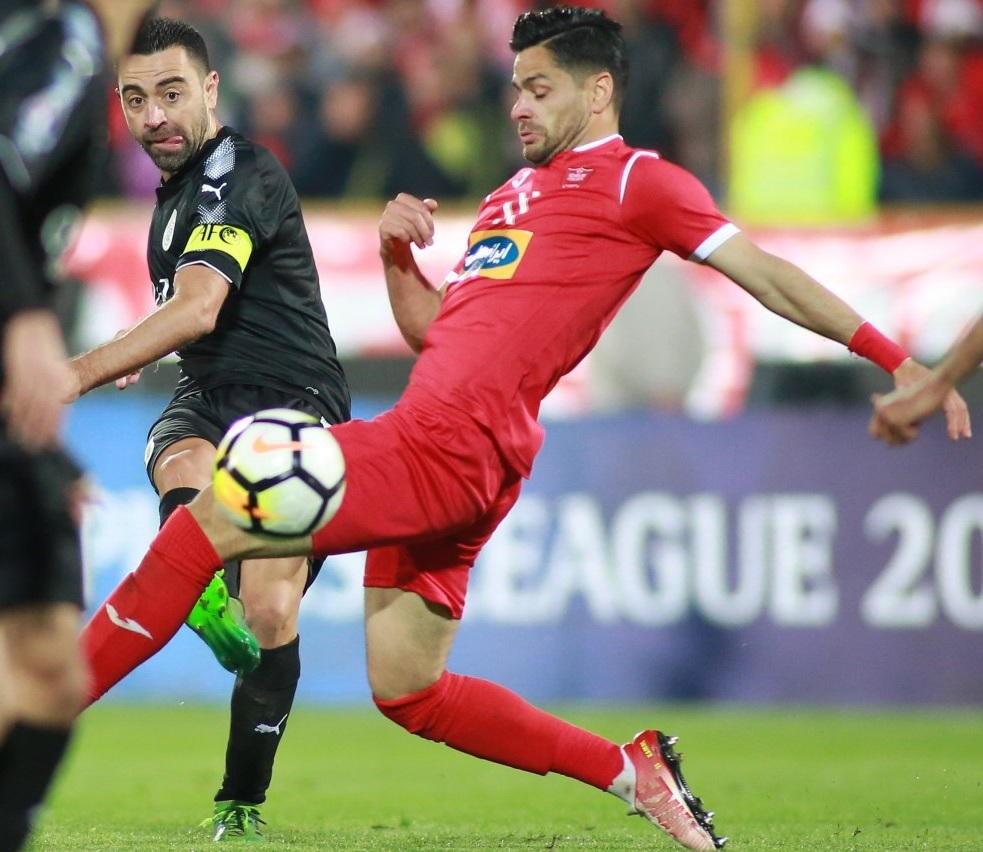 کمال کامیابی‌نیا و ژاوی در بازی پرسپولیس و السد